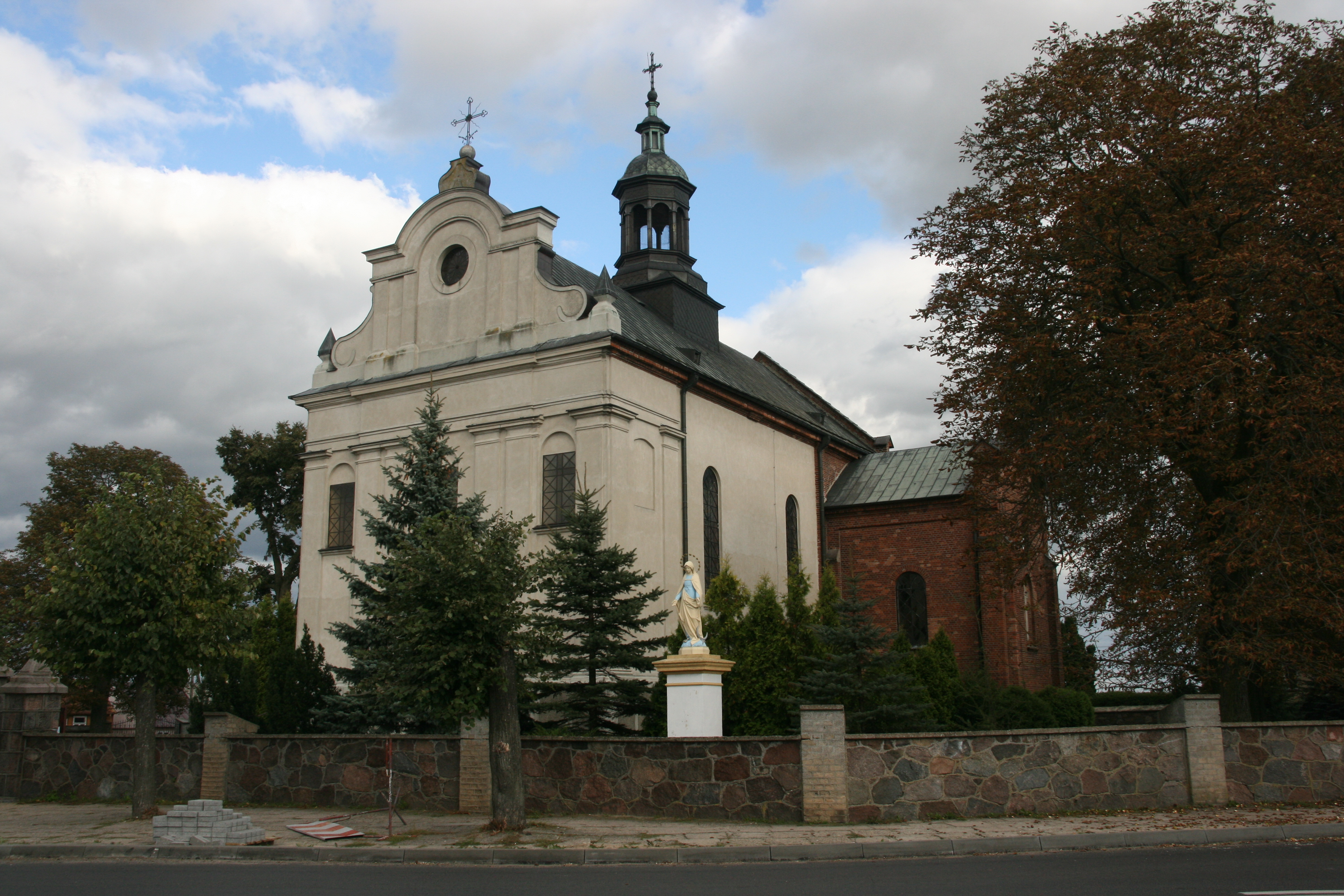 Bieżuń - kościół parafialny pw. Św. Trójcy z k. XVIII w. (zabytek nr A-132)